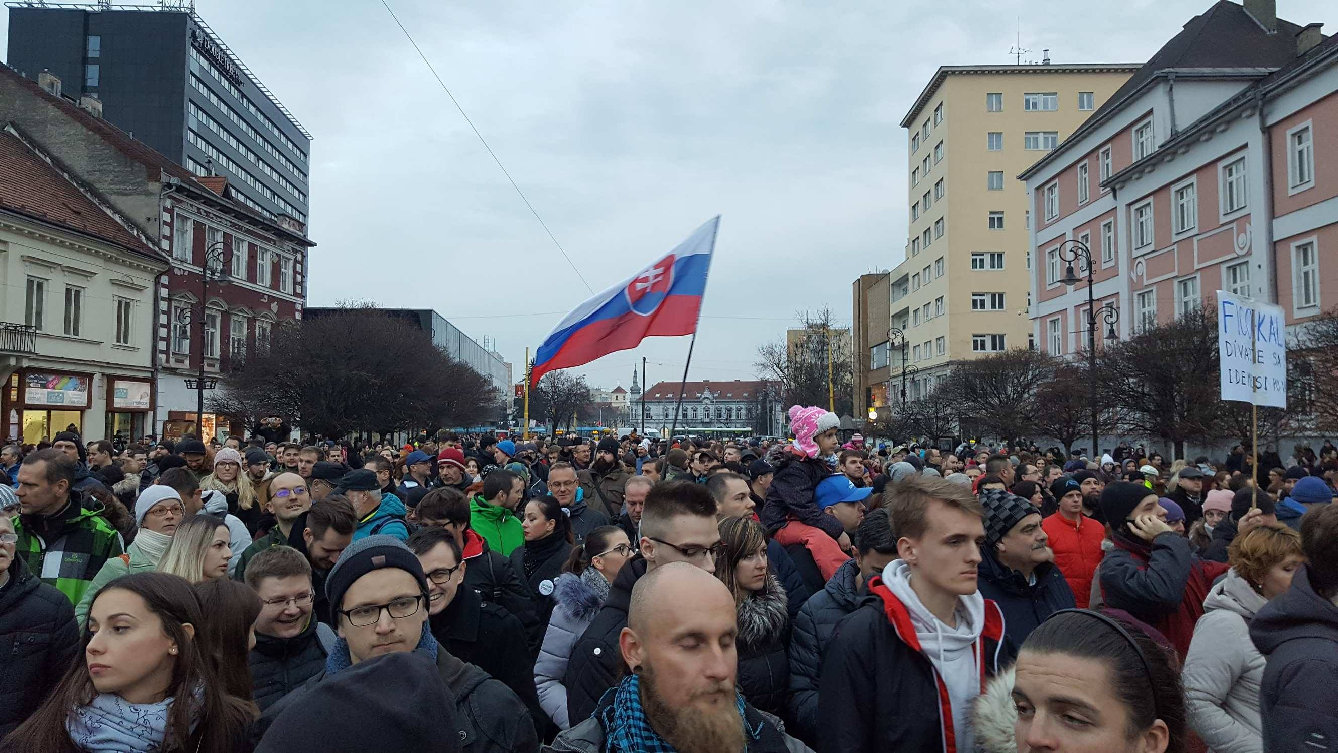 Protest v Košiciach, 9. marec 2018, Vražda Jána Kuciaka a Martiny Kušnírovej